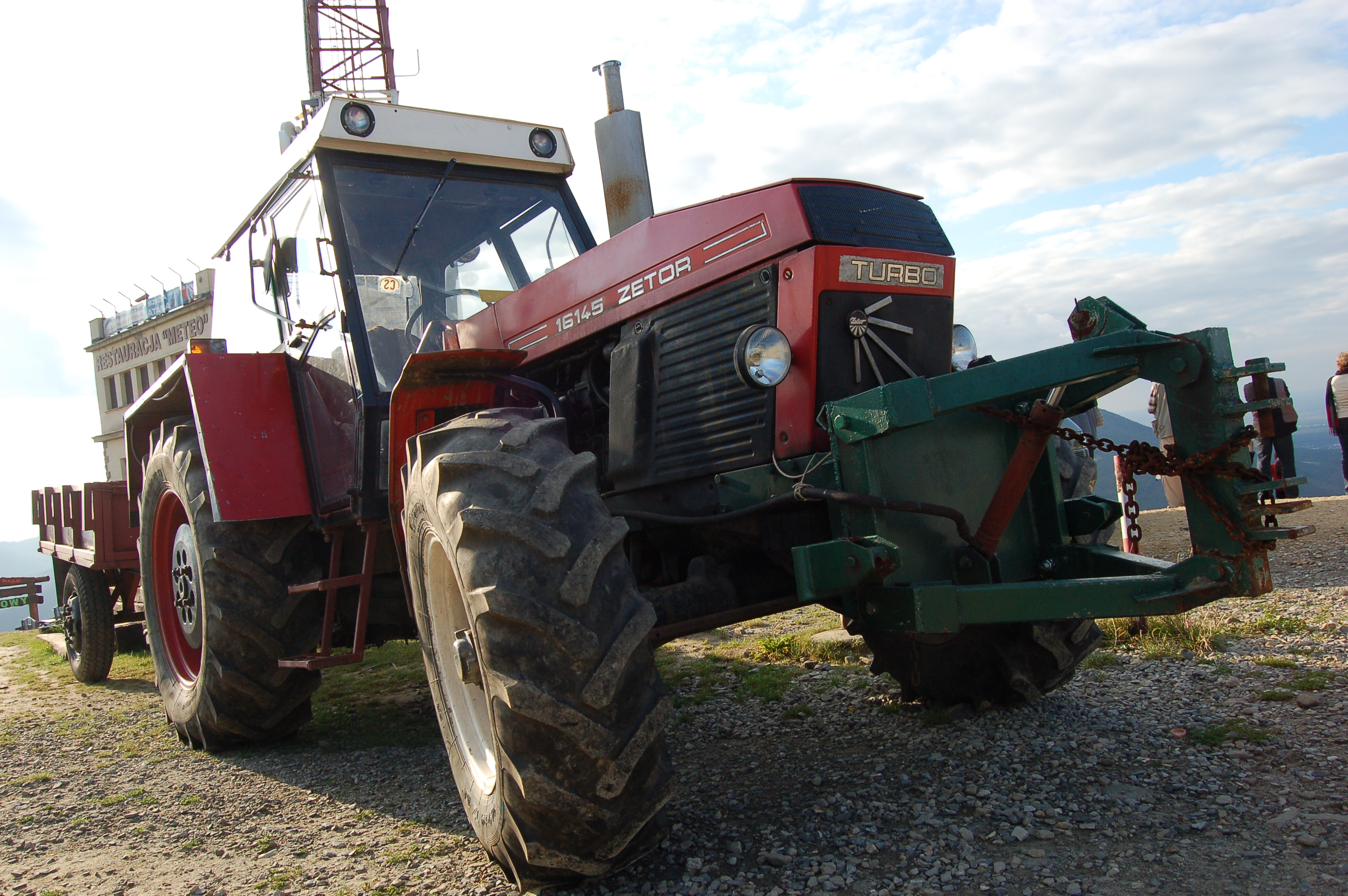 Góra Żar, Mount Zar